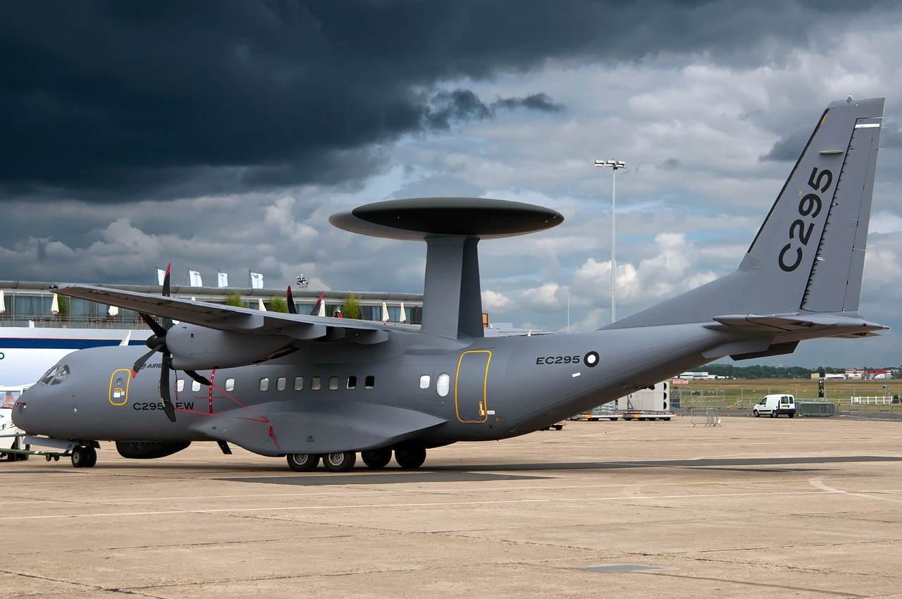 CASA C-295AEW EC-295 / 110 (cn P-001)